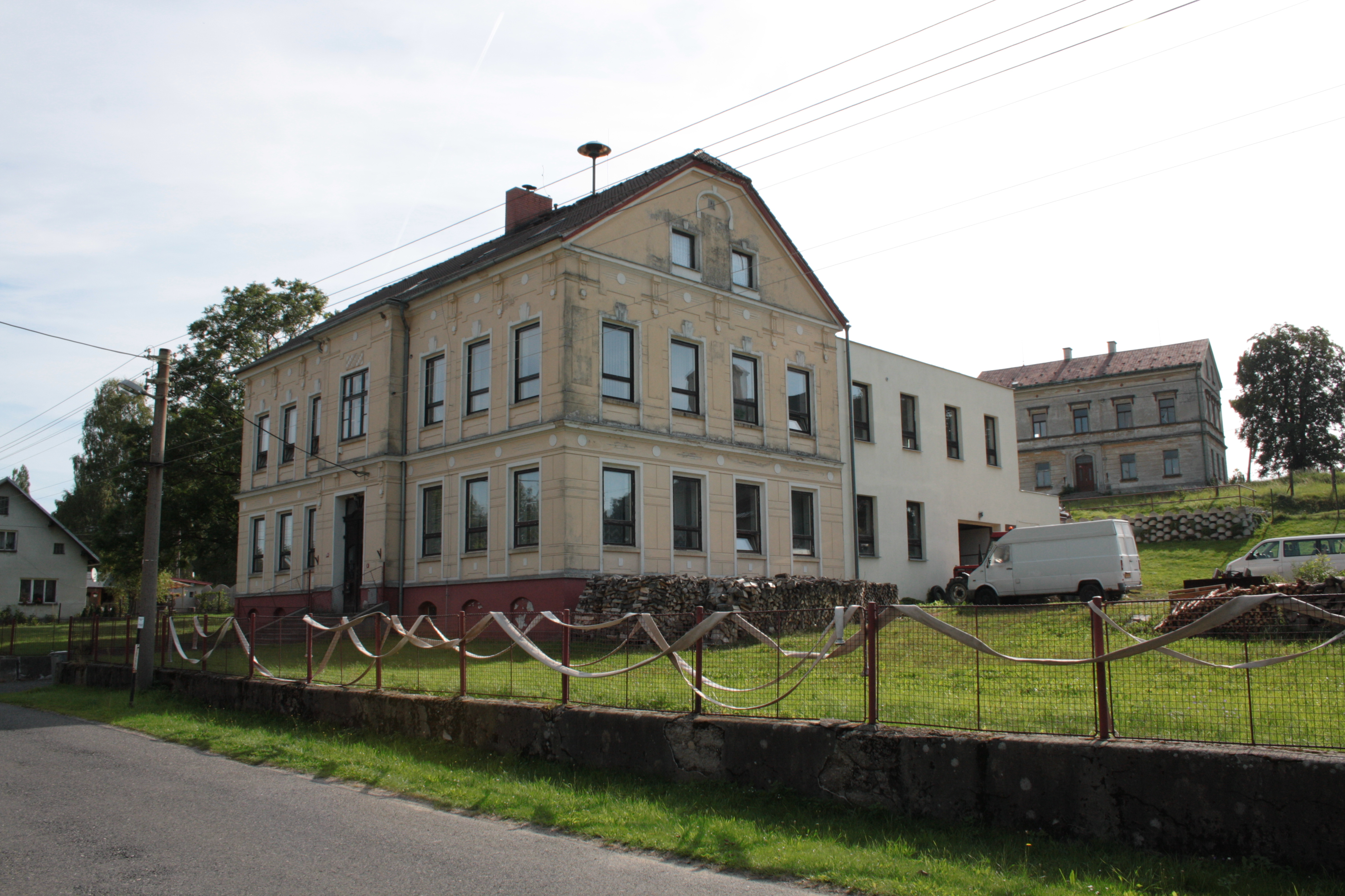 This photograph was taken with a DSLR from WMCZ's Camera grant. Budova bývalé školy s obecním úřadem v přístavbě ze zadní strany objektu (včetně skladu a garáží místních technických služeb). Na plotě se suší hasičské hadice.